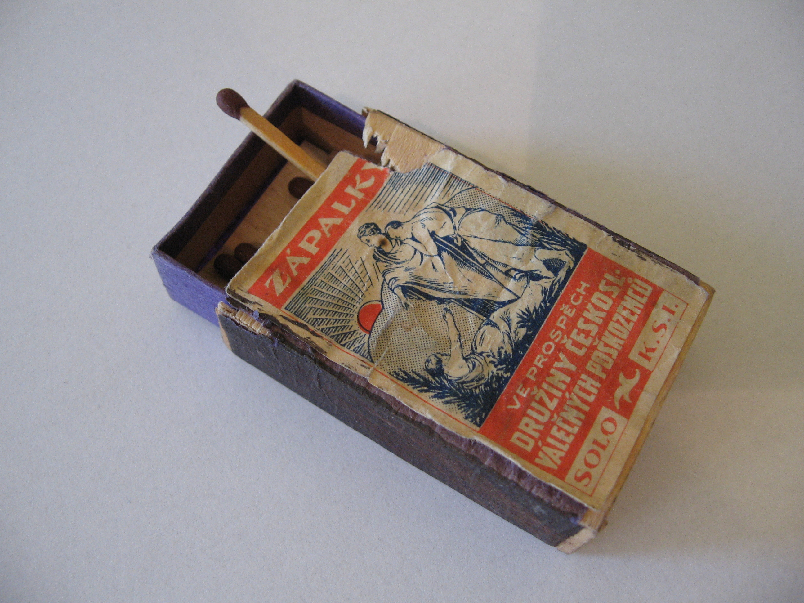 Krabička zápalek ve prospěch družiny československých válečných poškozenců